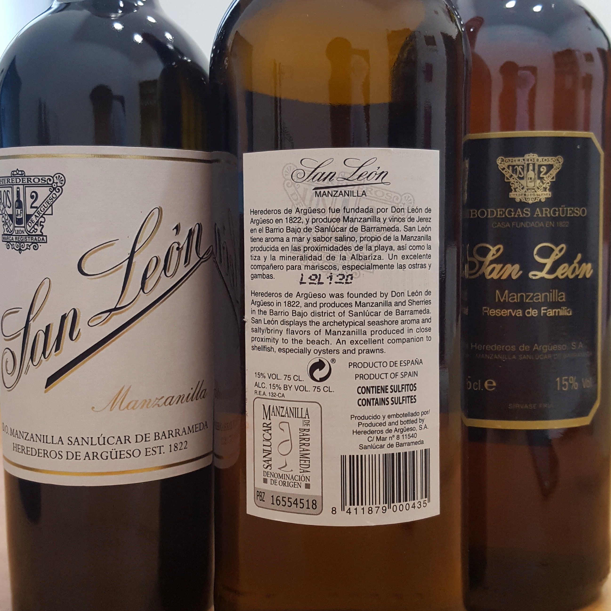 Etiquetas y contraetiquetas de la D.O. Manzanilla-Sanlúcar de Barrameda